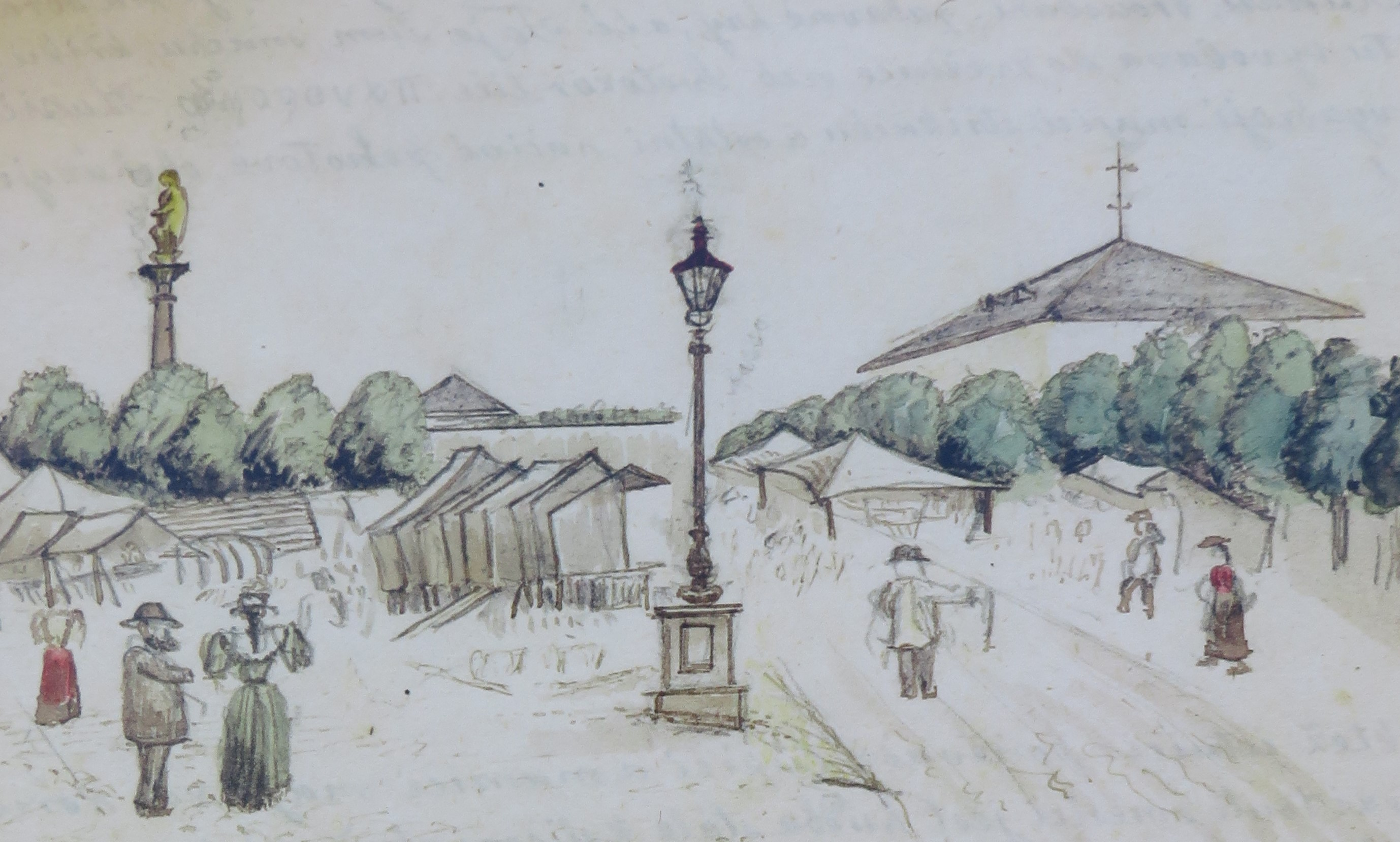 Trhy u příležitosti porcinkule na Velkém náměstí v Opočně dne 2. srpna 1894. Nakreslil Alois Beer z Dobrušky (1833–1897)